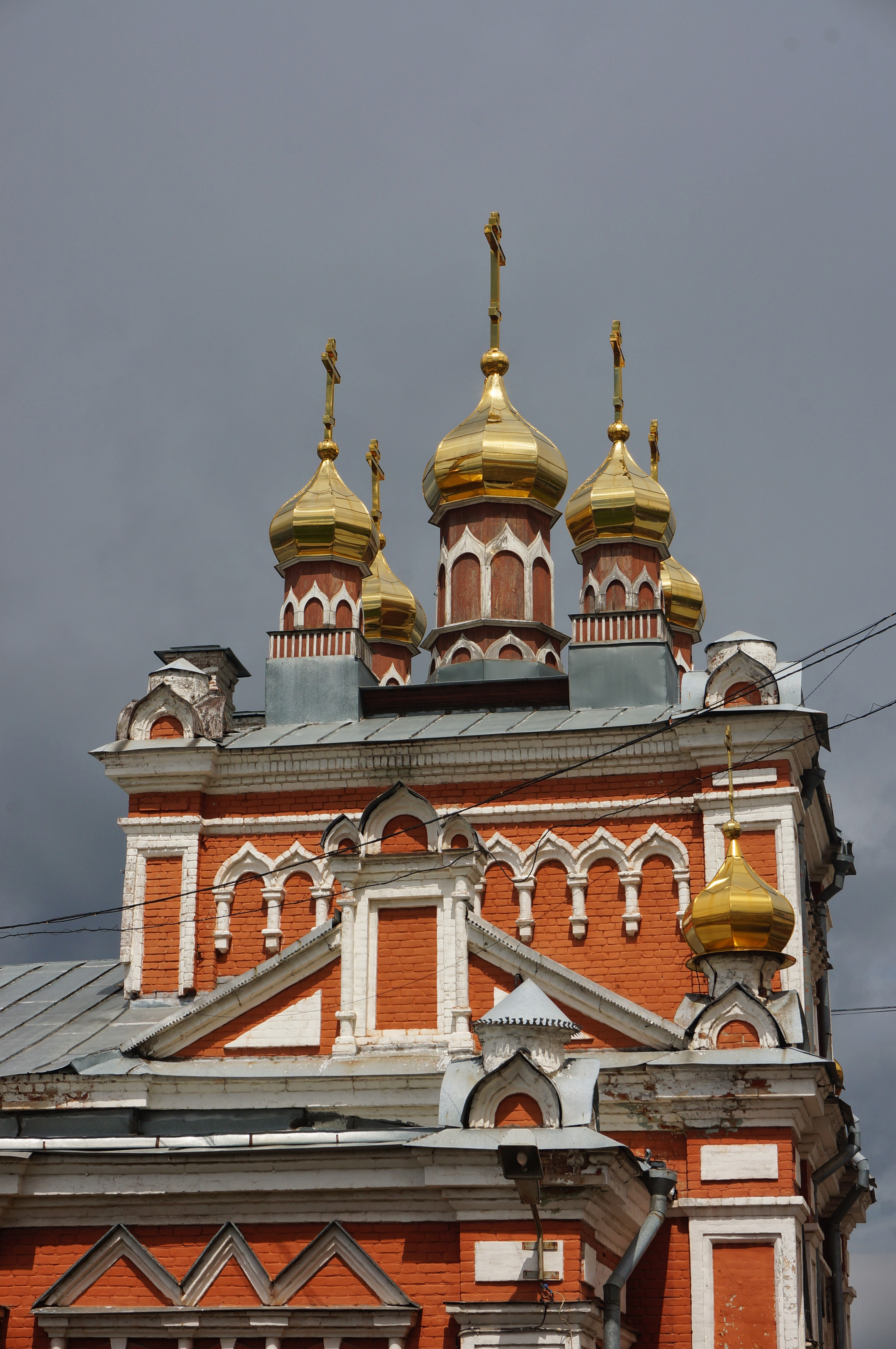 Иверский женский монастырь, Самара, Россия